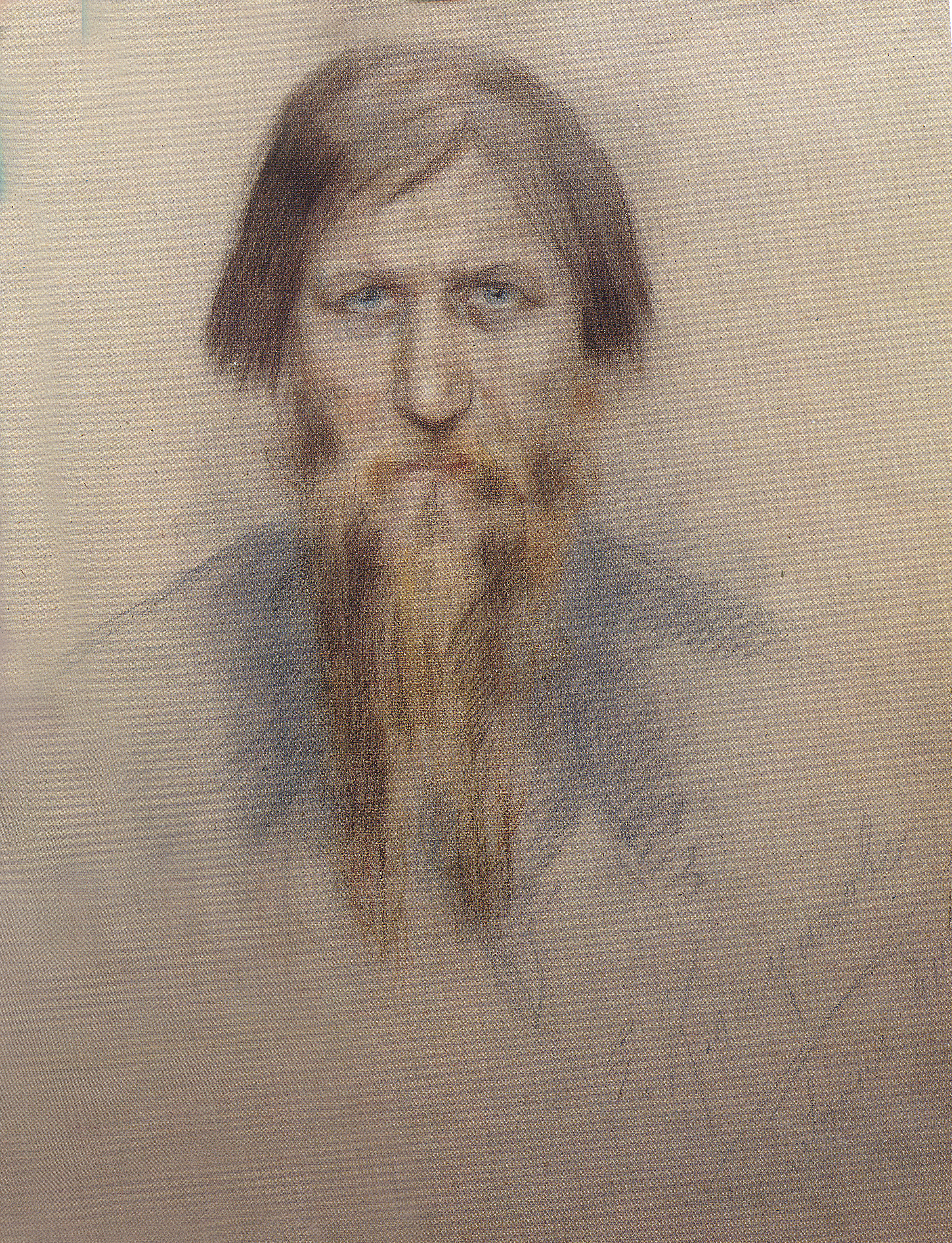 Распутин. Г. Е. Картон серый, цветной карандаш, пастель. 81.5 x 56 см. атрибуция